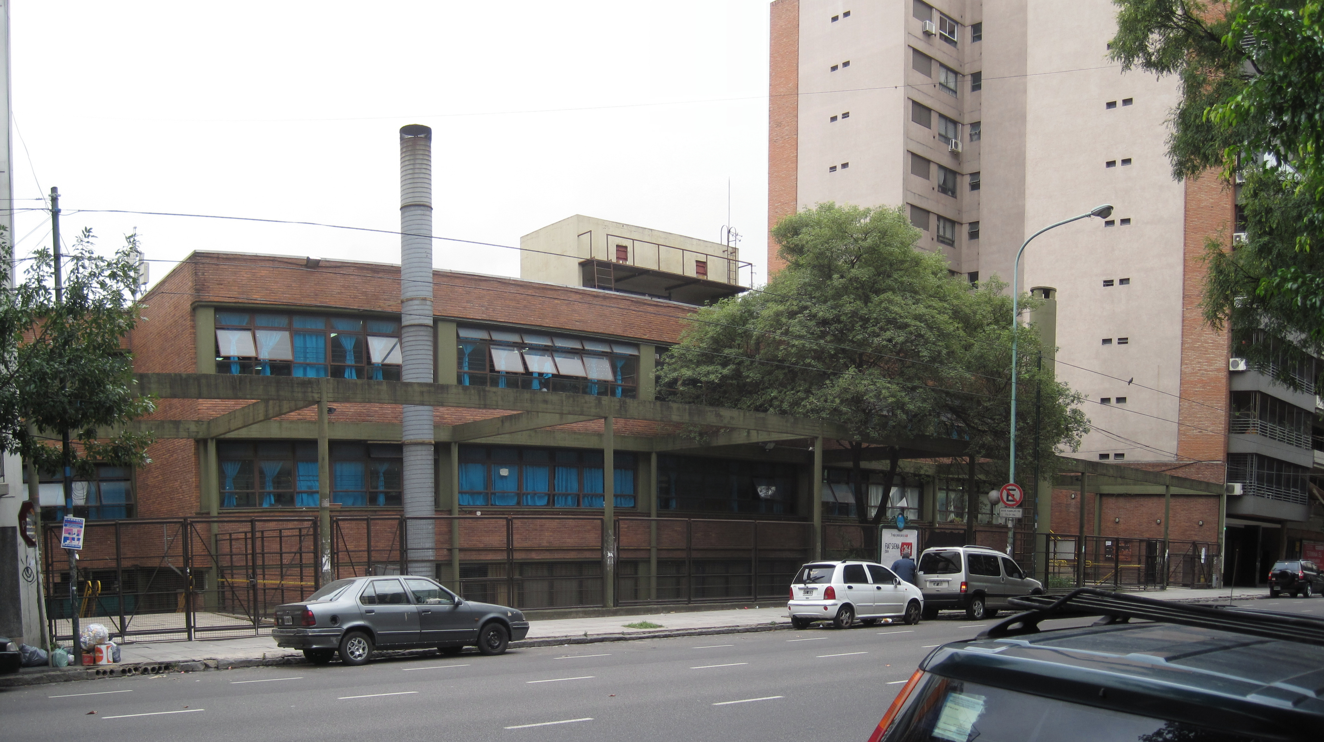 Fachada de la Esc. Primaria Nº 12 Provincia del Chaco en Buenos Aires.